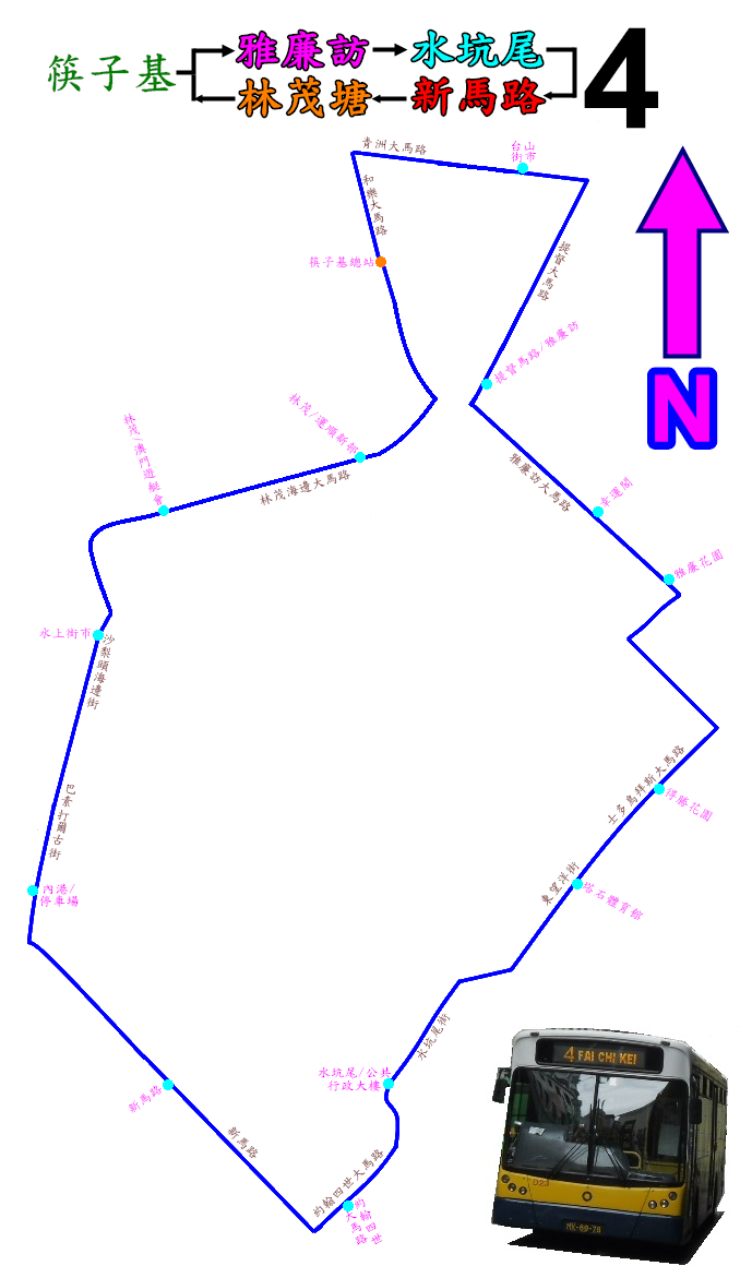 中文（香港）: 澳門巴士4路公車的走線圖